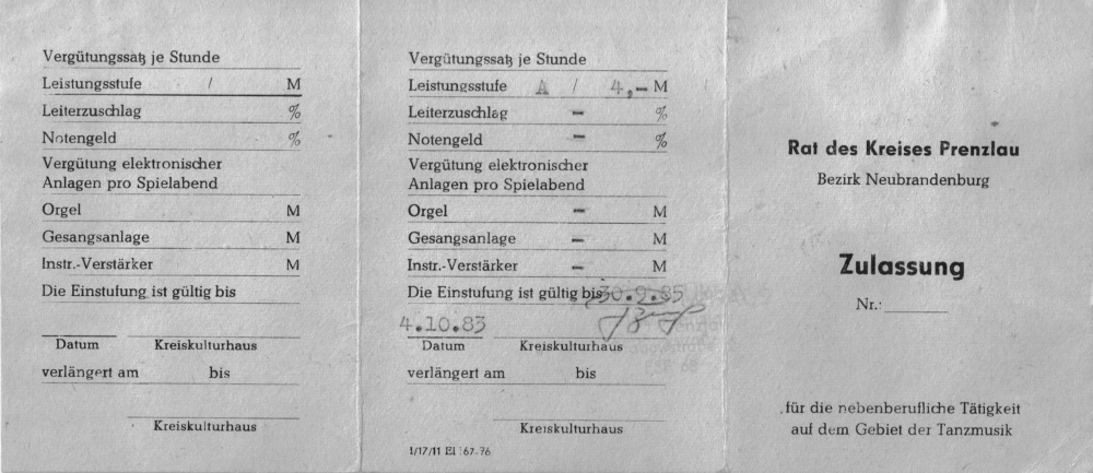 Staatliche Spielerlaubnis der ehemaligen DDR, Außenseite des zusammenklappbaren Ausweises